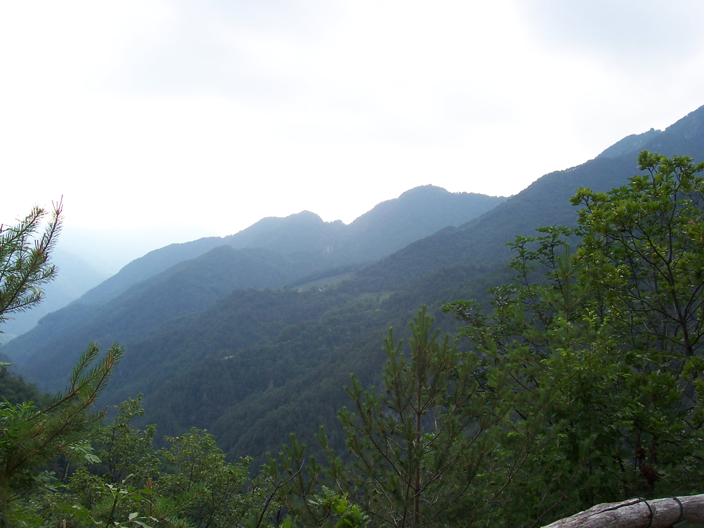 Droane frazione di Valvestino